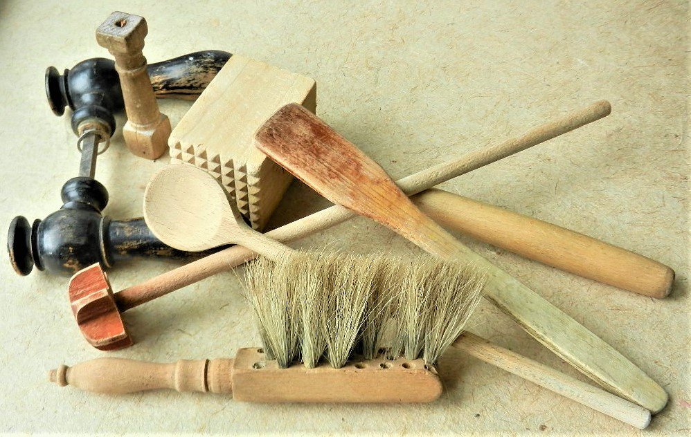 Nebengewerbegegenstände von Spillenmachern, u.a. Küchengeräte